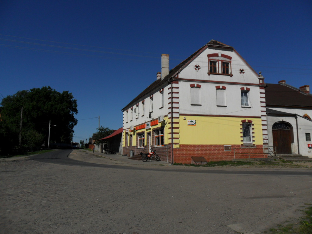 Starosiedle